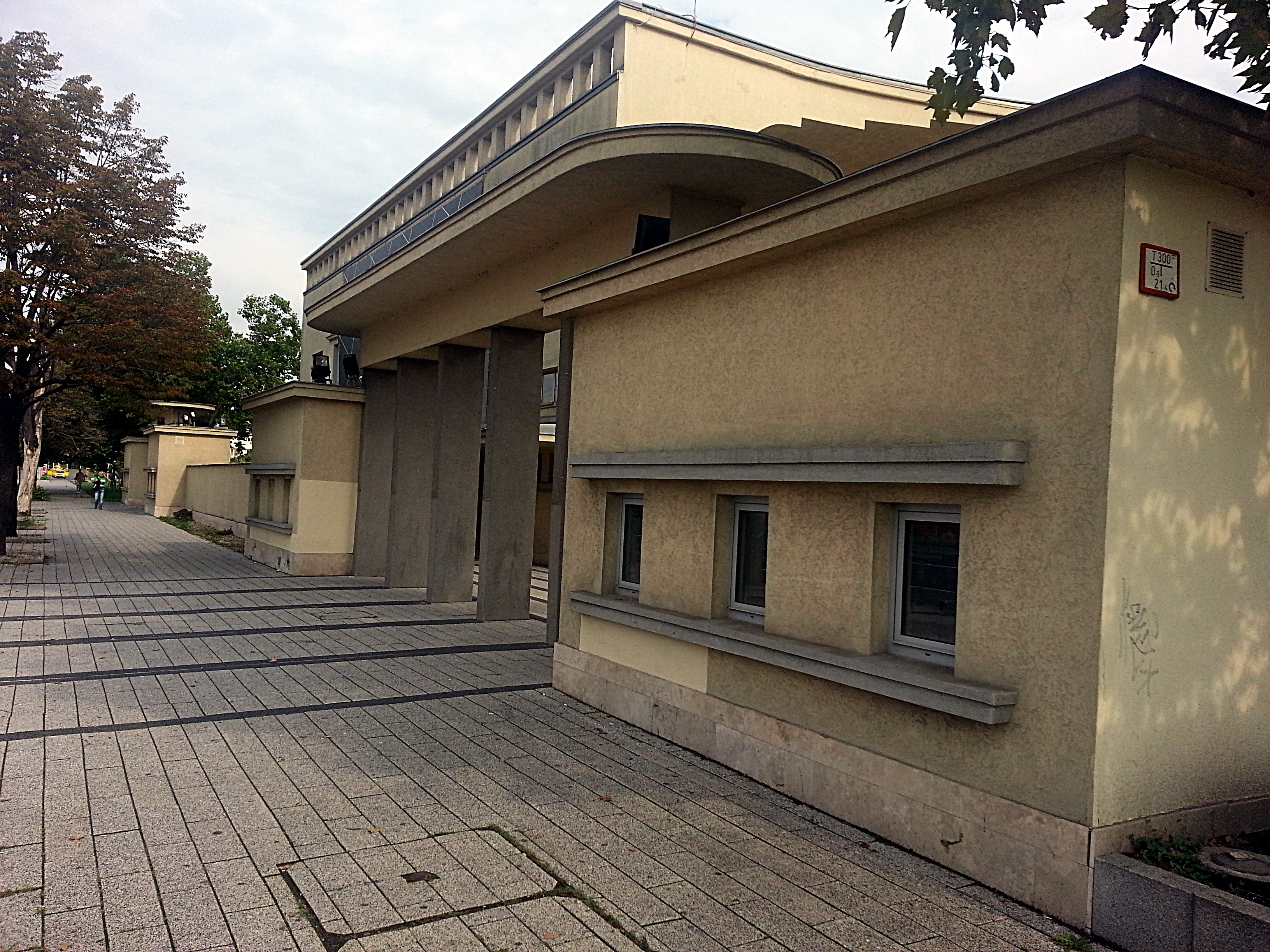 A Kerepesi úti egykori ügetőpálya műemlék épülete. Nemzeti Lovarda főépülete és istállója ID 12002. - Budapest VIII. kerület, Kerepesi út 9. Aréna Plaza.